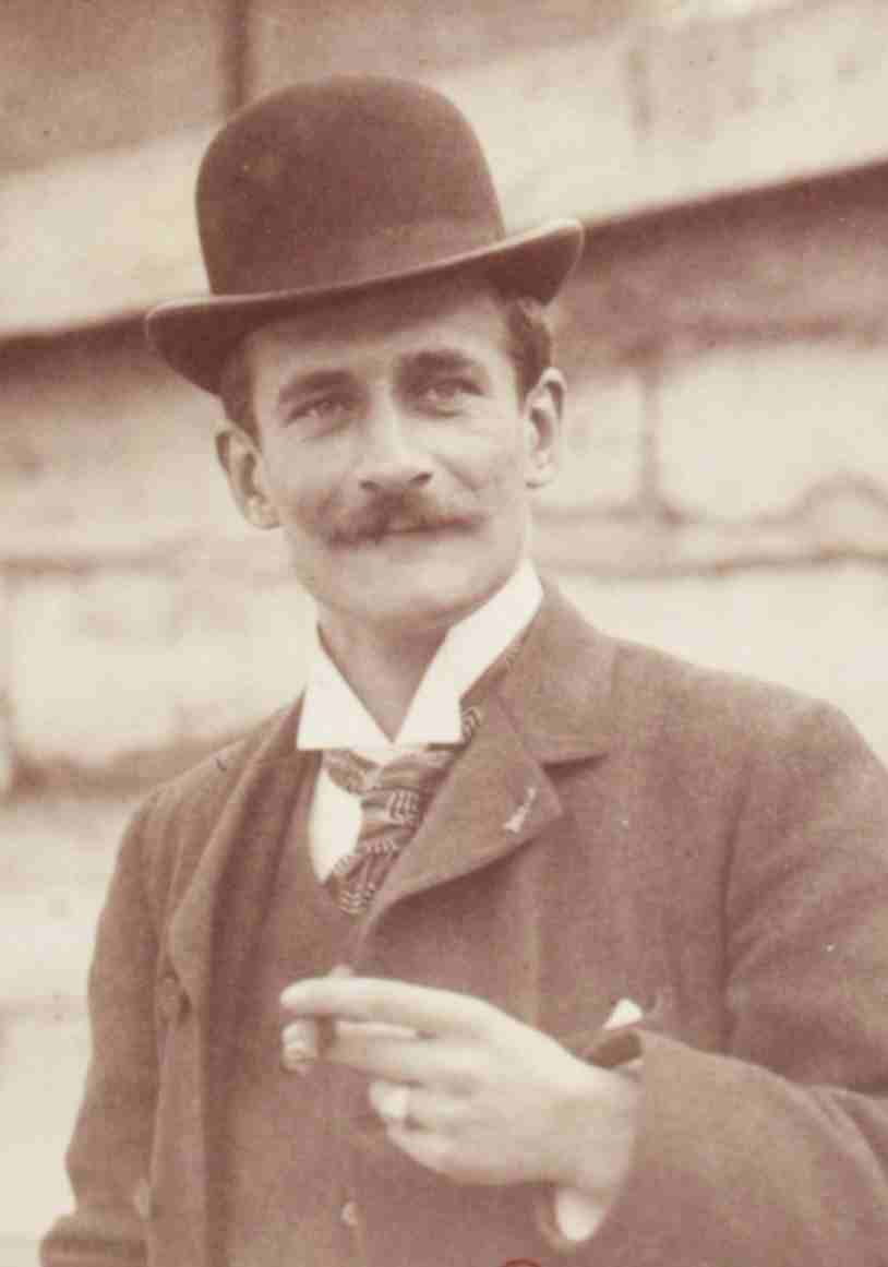 [Collection Jules Beau. Photographie sportive] : T. 21. AnnÃ©e 1903 / Jules Beau : F. 35v. [Paris - Madrid, Tuileries, 19 - 22 mai 1903]